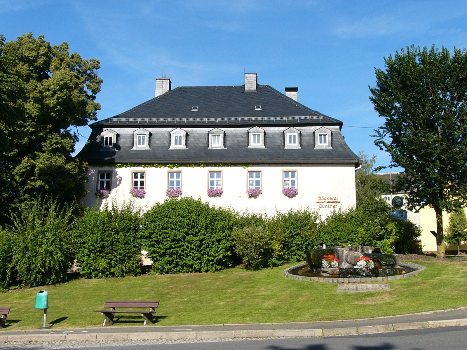 Denkmalgeschützte Gebäude in Sparneck